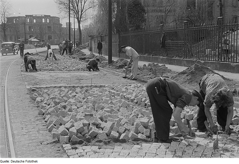 Original image description from the Deutsche Fotothek Dresden. Straßenbauarbeiter beim Setzen von Großpflaster